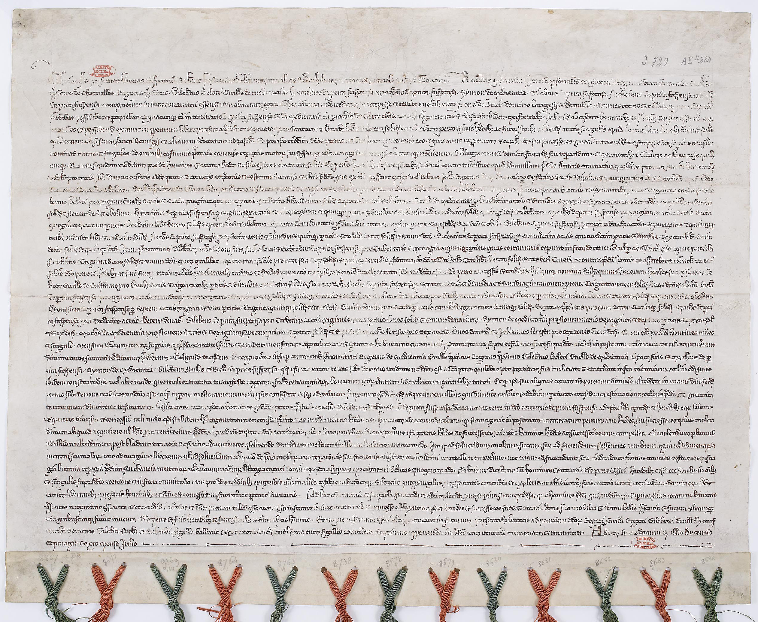 Bail à ferme de terres à Charnelles (Eure) par Pierre de la Broce, chambellan du roi de France Philippe III. Verneuil, juillet 1276.